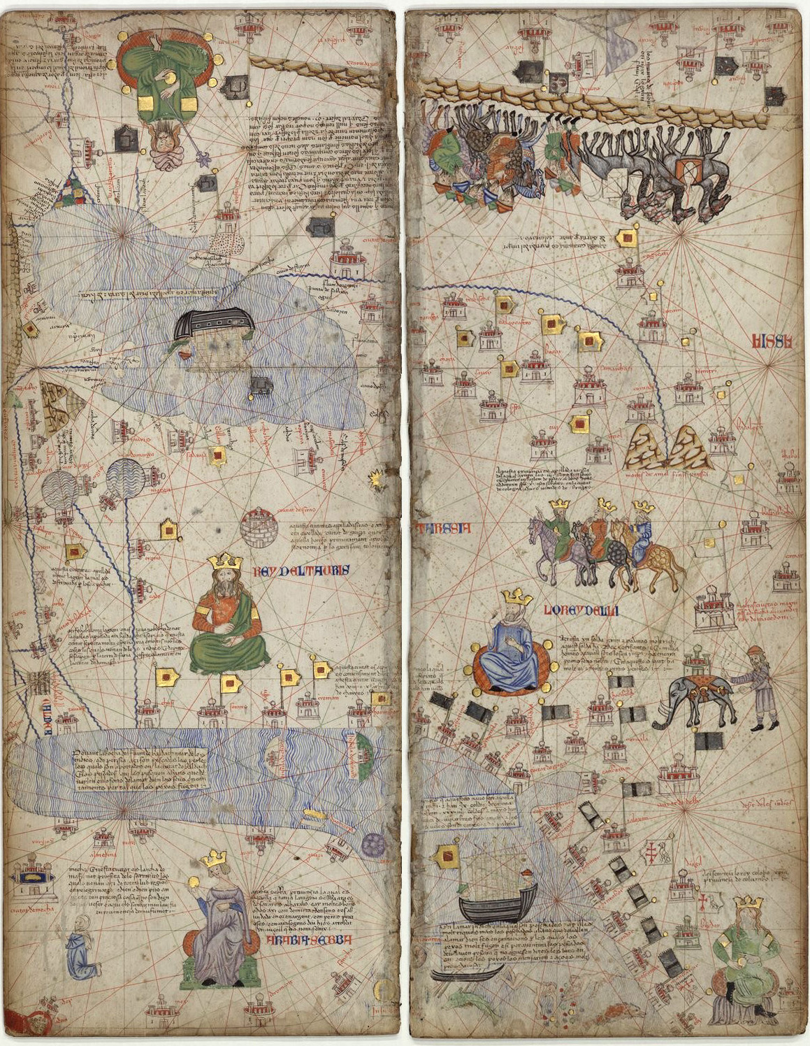 Full 5 de l'Atles Català de Biblioteca Nacional de França